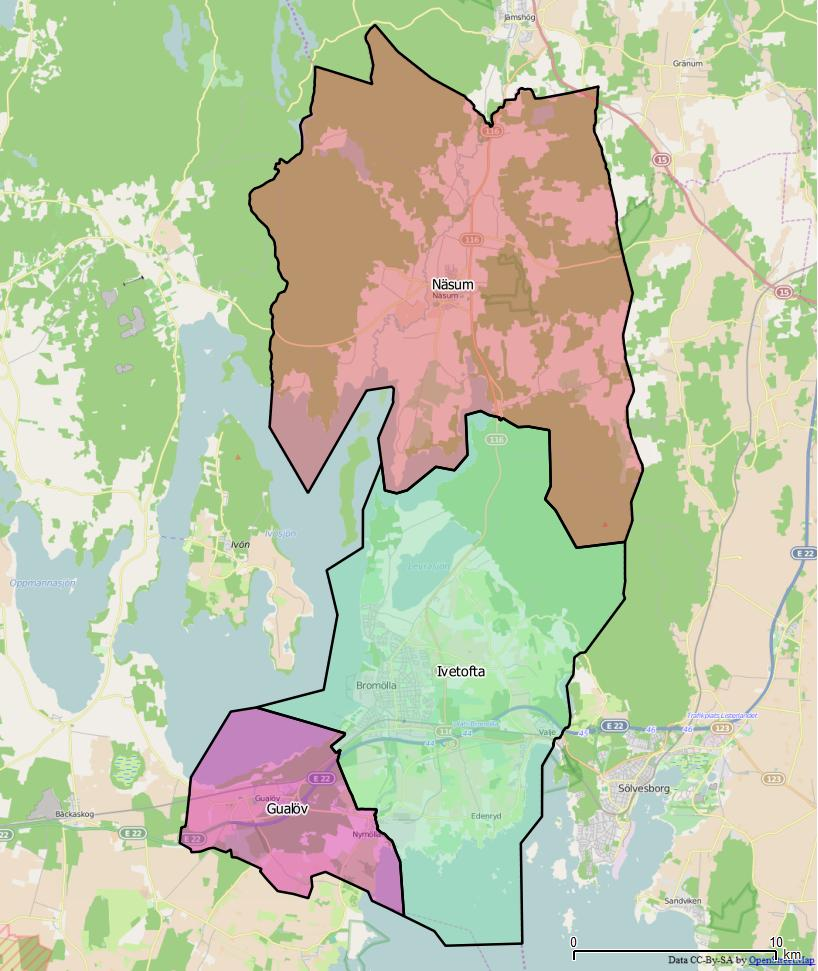 Distriktsindelningen i Bromölla kommun